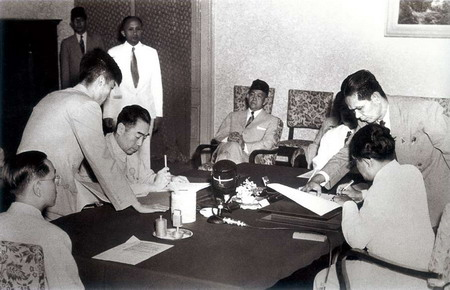 中文（中国大陆）: 中国国务院总理兼外交部长周恩来与印度尼西亚外交部长苏纳约共同签署两国关于双重国籍问题的条约。